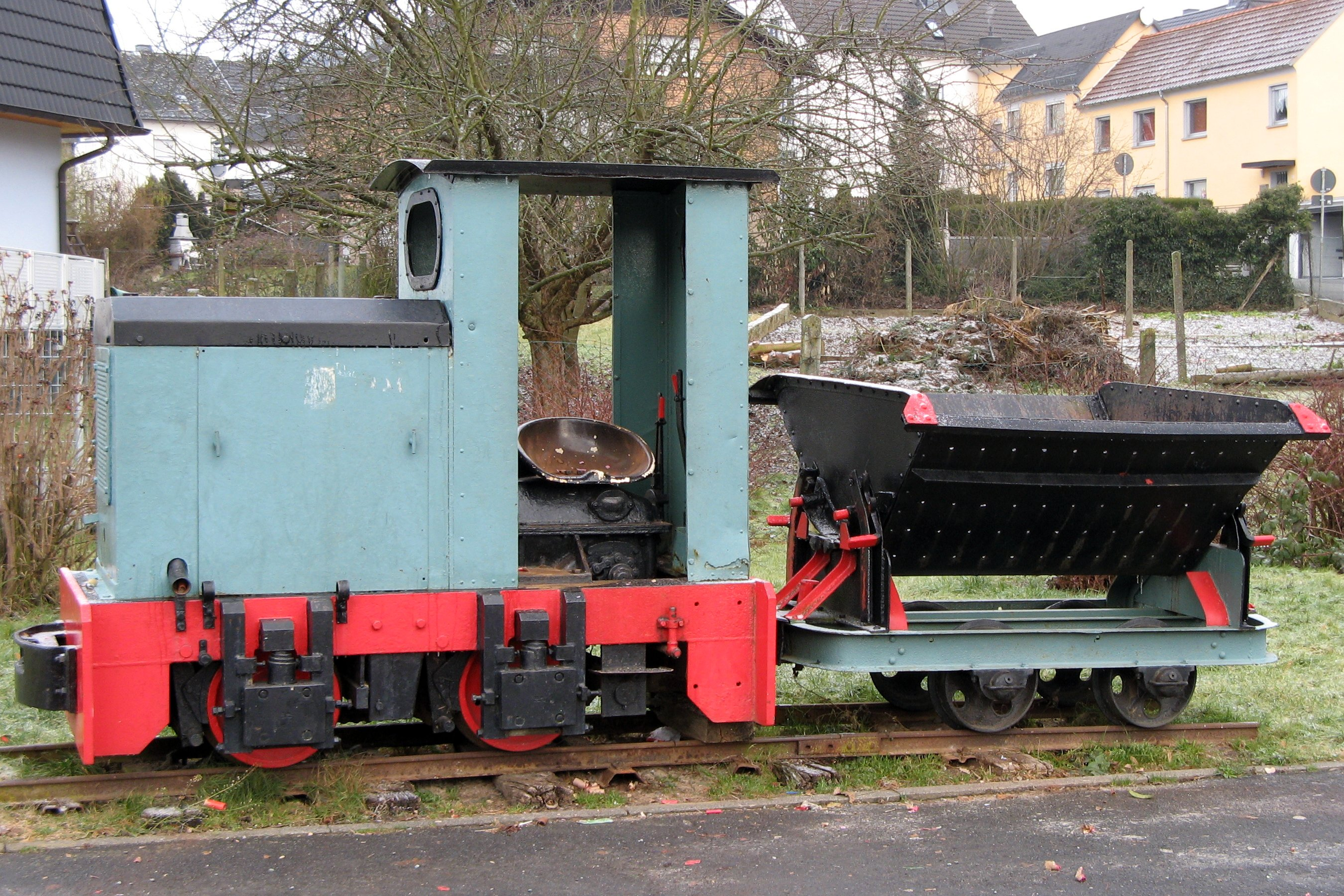 Grubenlokomotive (gebaut von O+K Nordhausen 1942), heute Industriedenkmal in Hintermeilingen, Hessen, Deutschland